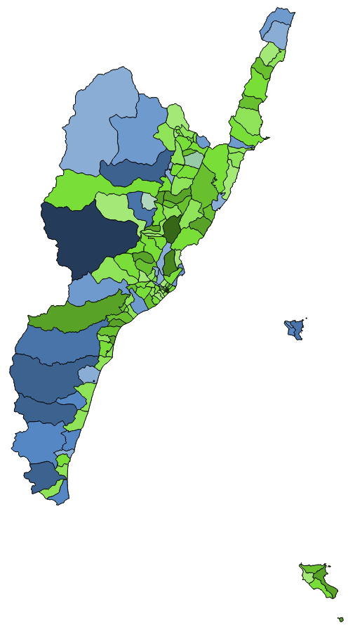 中文（台灣）: 顏色對照表